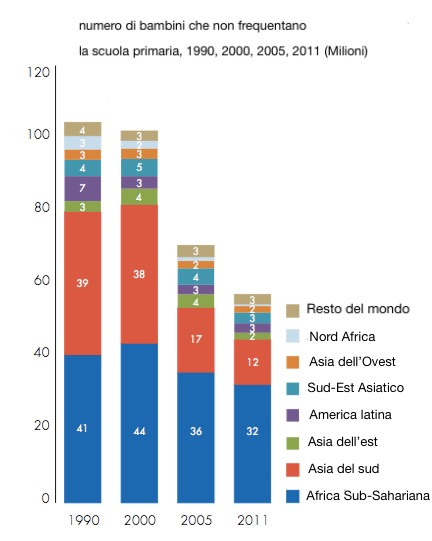 Il grafico mostra il numero di bambini che non frequenta la scuola primaria dal 1990 al 2011, (milioni)